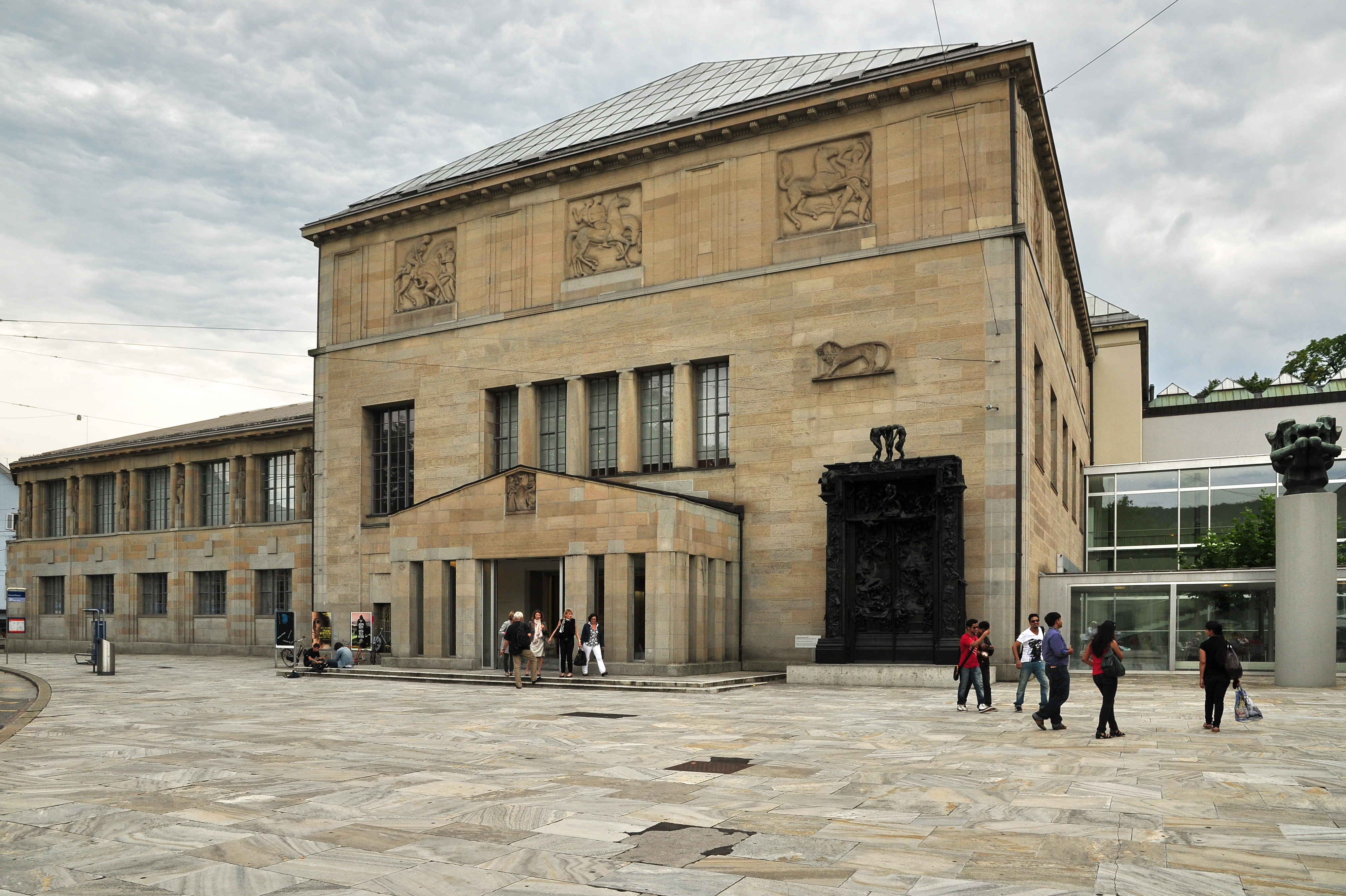 Kunsthaus in Zürich (Switzerland)